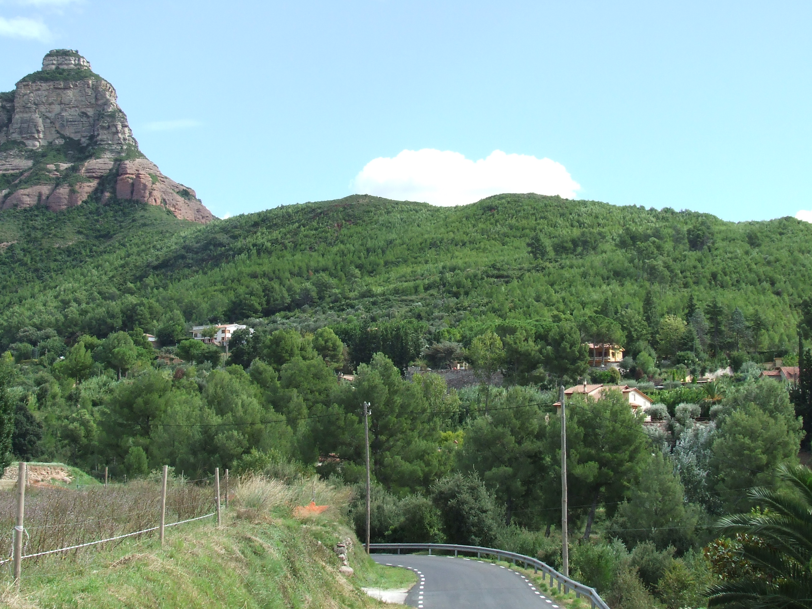 Serra de Can Tabola (Riells del Fai, Bigues i Riells, Vallès Oriental)